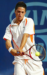 Matteo Trevisan